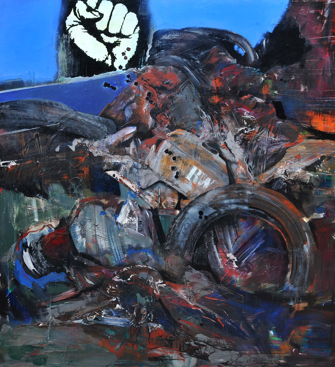 Franta, Barikáda (2012), akryl, plátno 200 x 200 cm